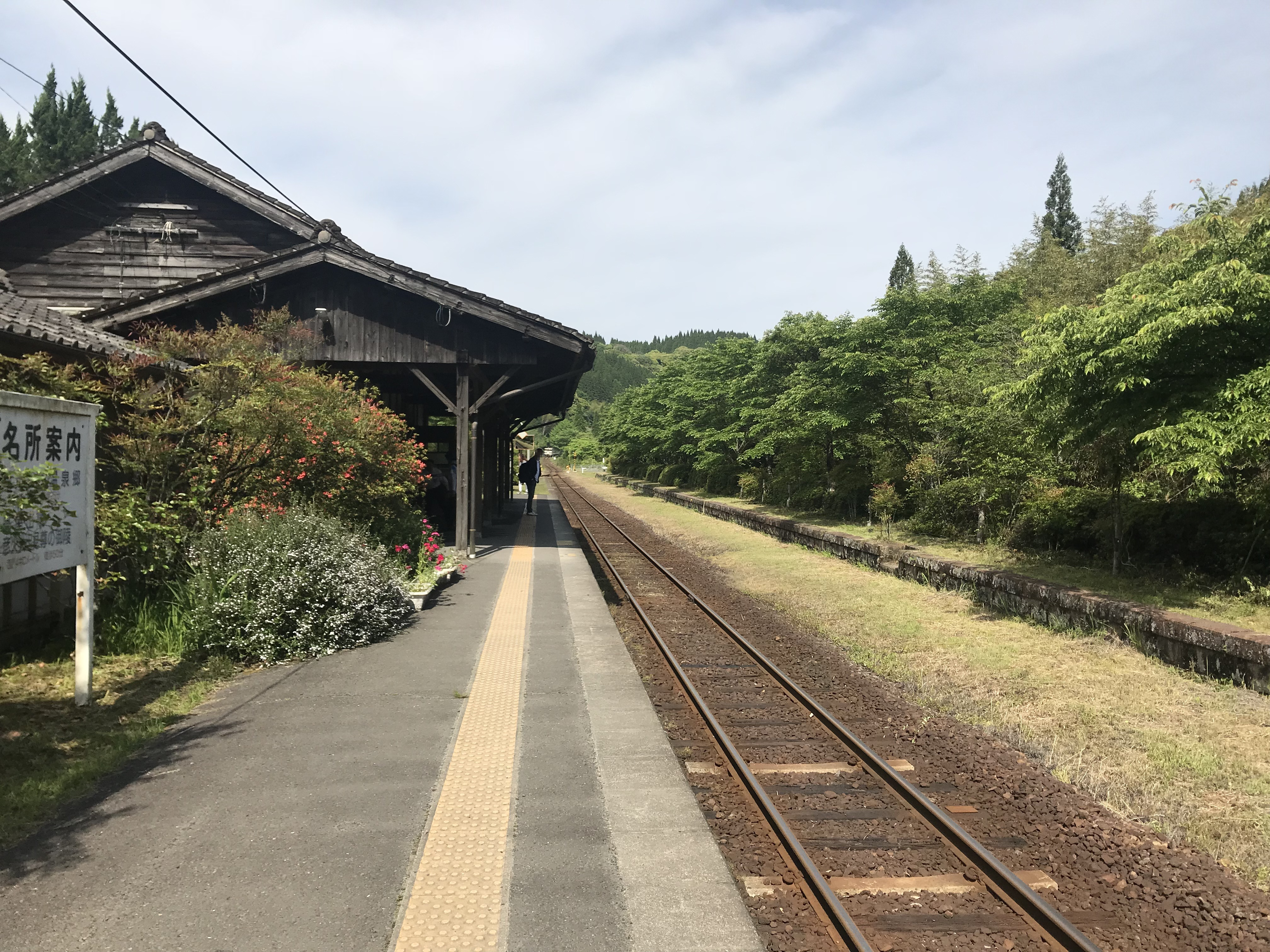 嘉例川駅のホーム(奥は霧島温泉方面)